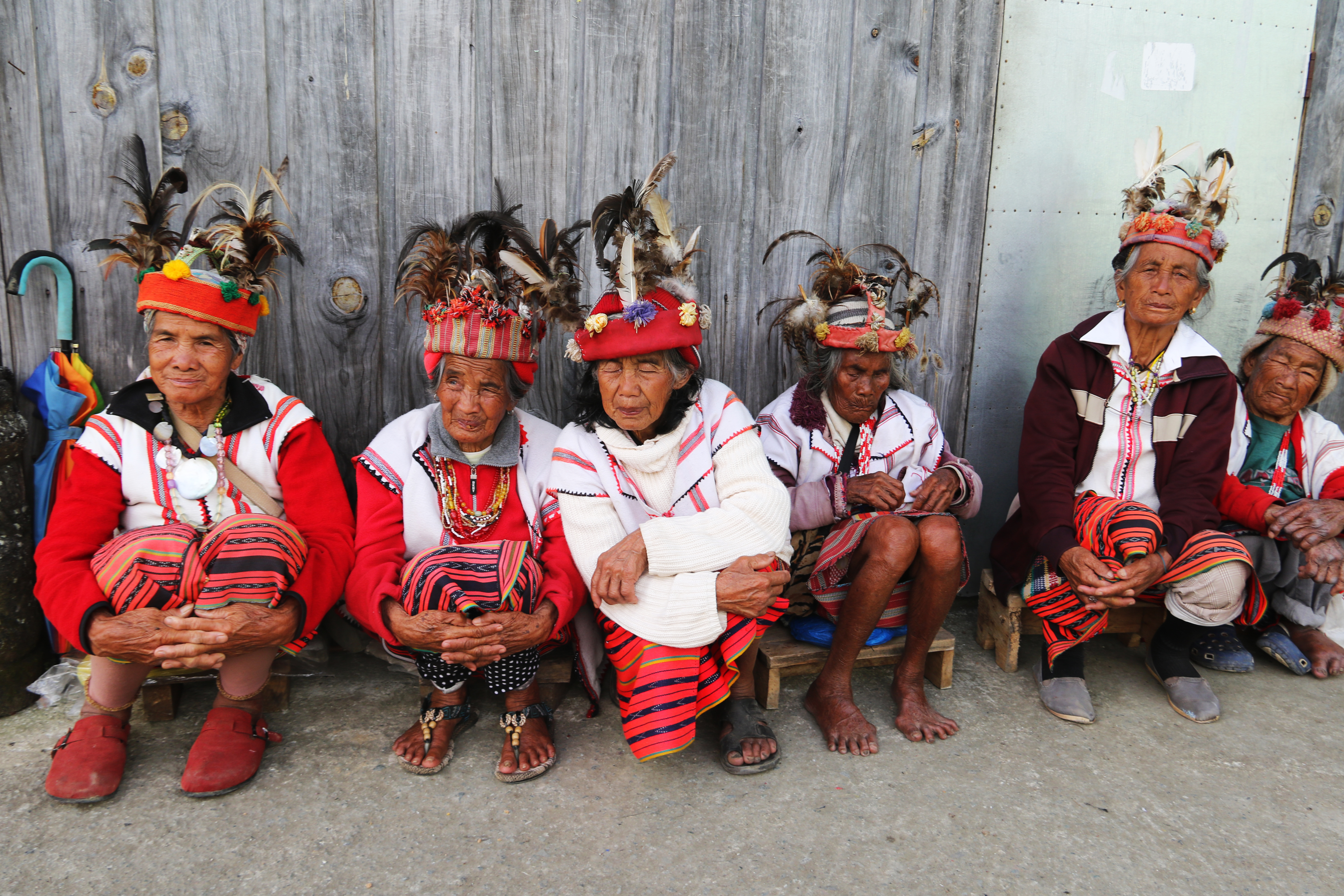 vielles dames ifugao philippines